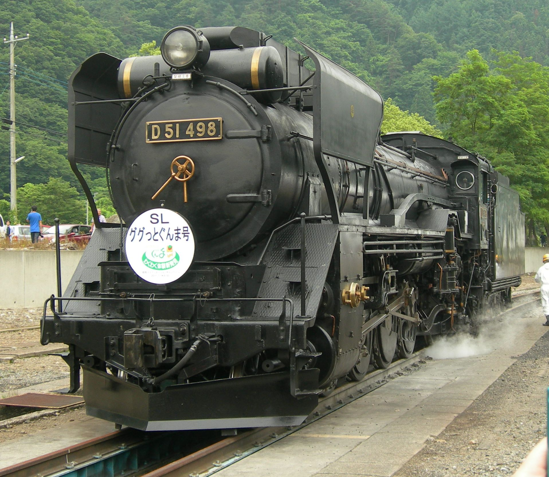 国鉄D51形蒸気機関車